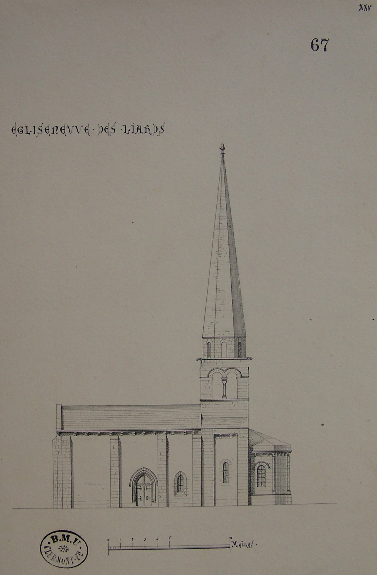 Dessin en élévation de l'église par Mallay, 19ème siècle.